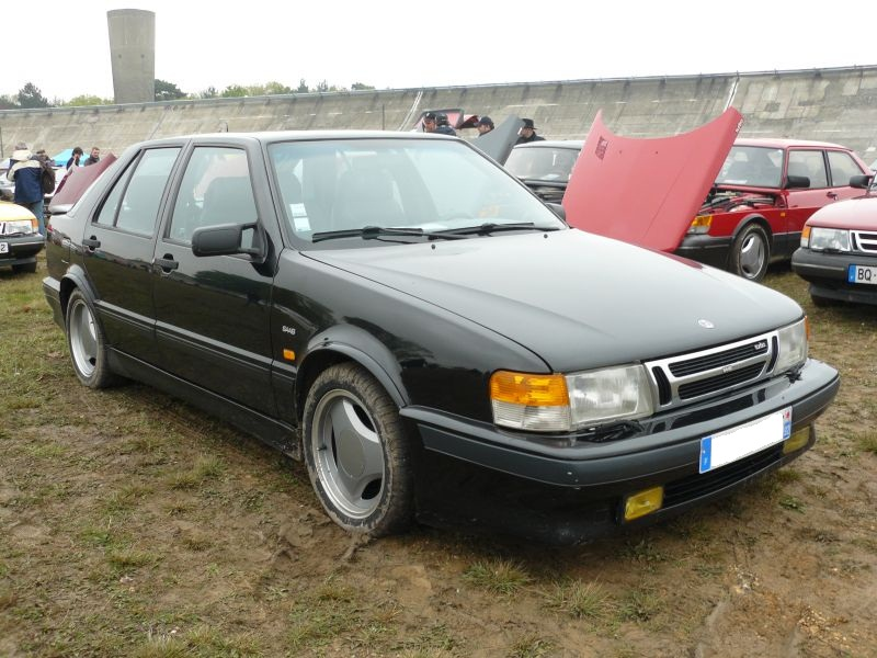 Français cadien: Montlhery Avril 2012